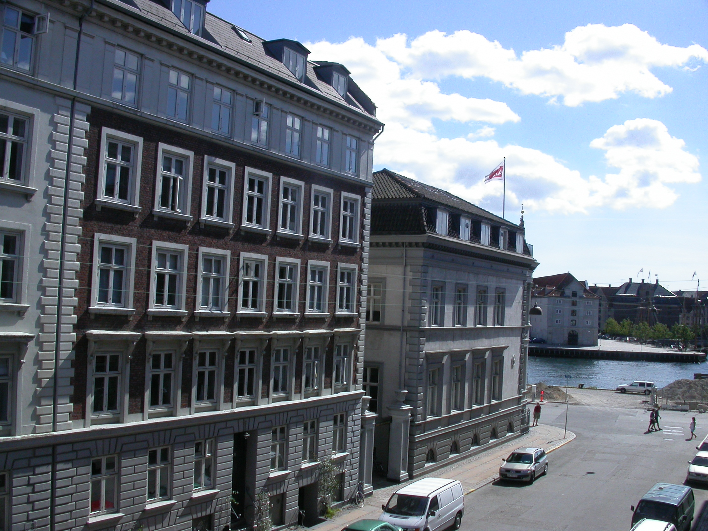 Tordenskjoldsgade in the Gammelholm neighbourhood of Copenhagen, Denmark